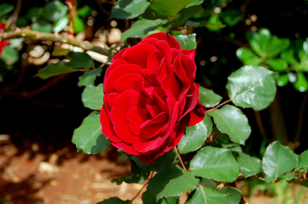 Красная роза